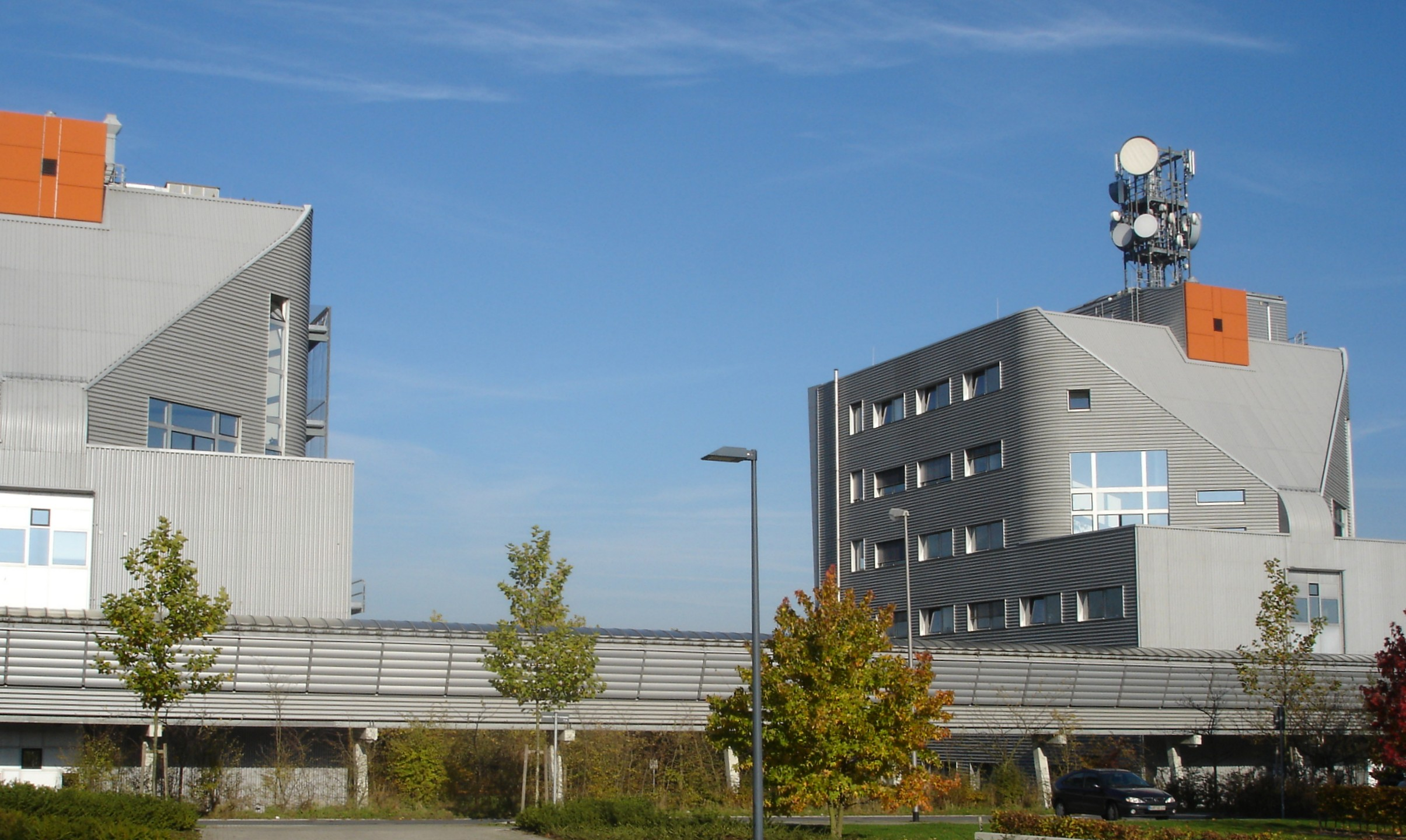 Technologiehof in Muenster (Westphalia), Germany